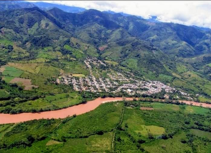 Panorámica de El Tarra capital del catatumbo Esta fotografía fue tomada en un área protegida de Colombia con el código 44 del RUNAP.